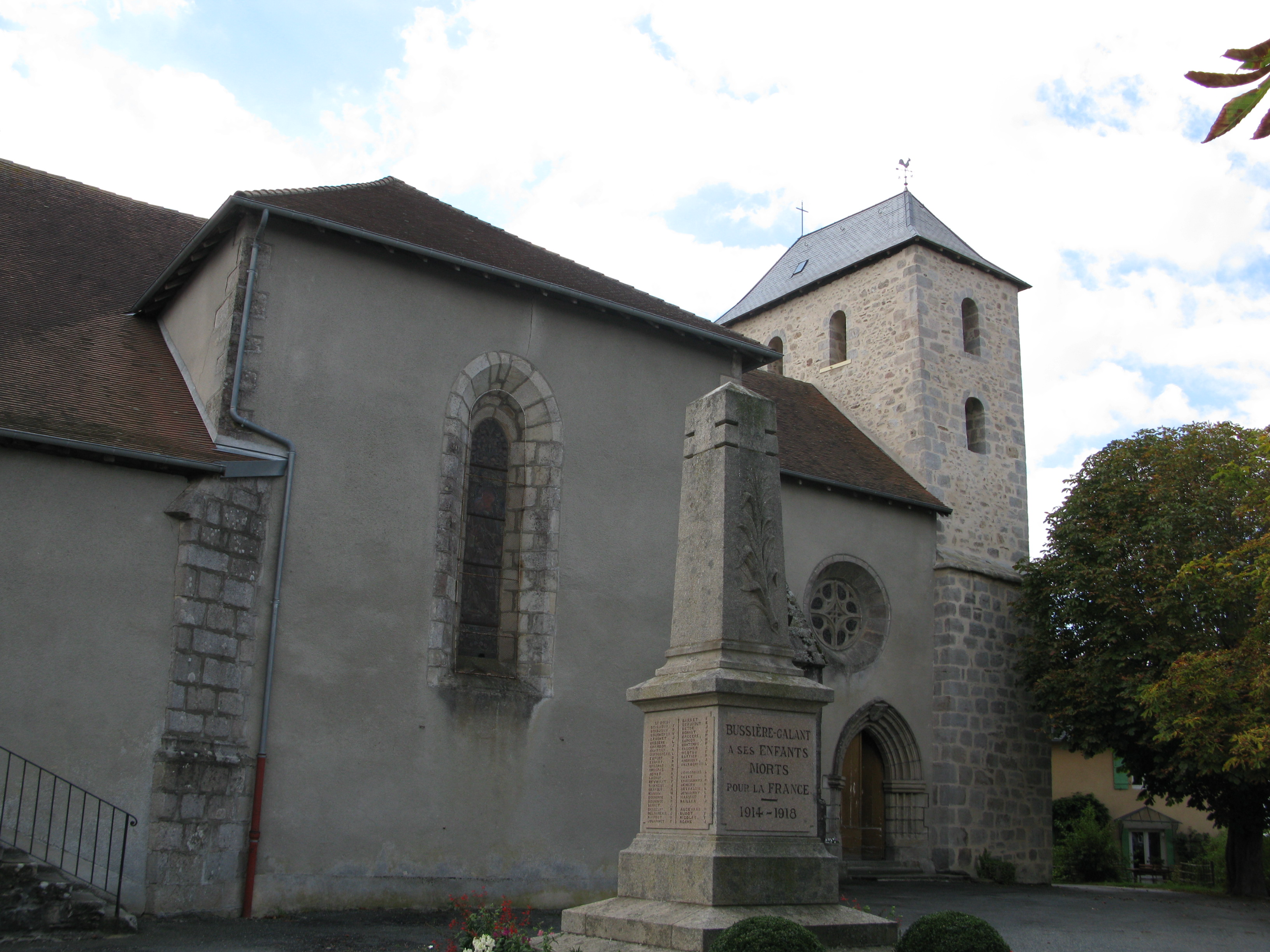 L'Église de Saint-Martin à Bussière-Galant